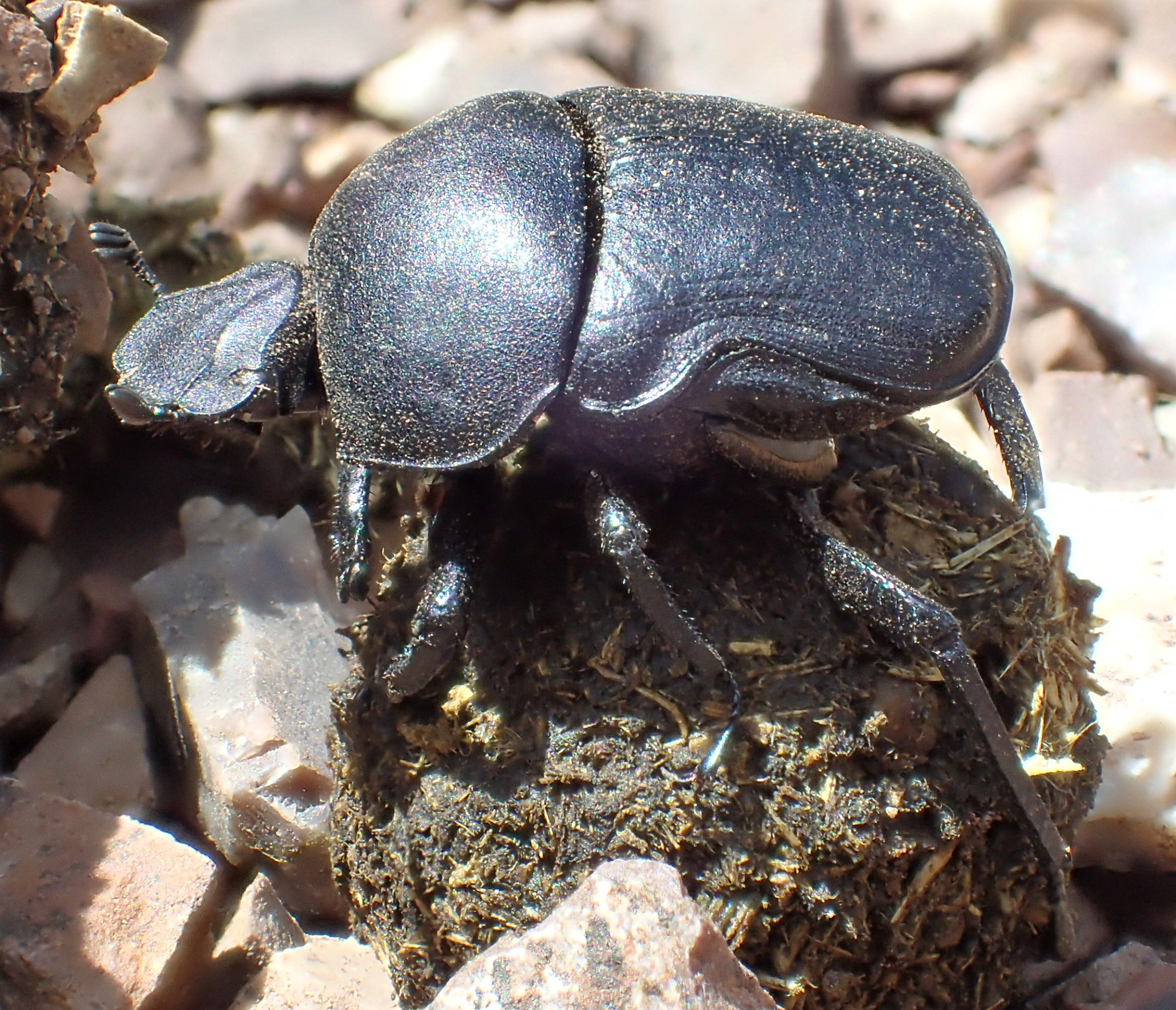 Gymnopleurus geoffroyi aus Griechenland, Peloponnes, bei Andritsena